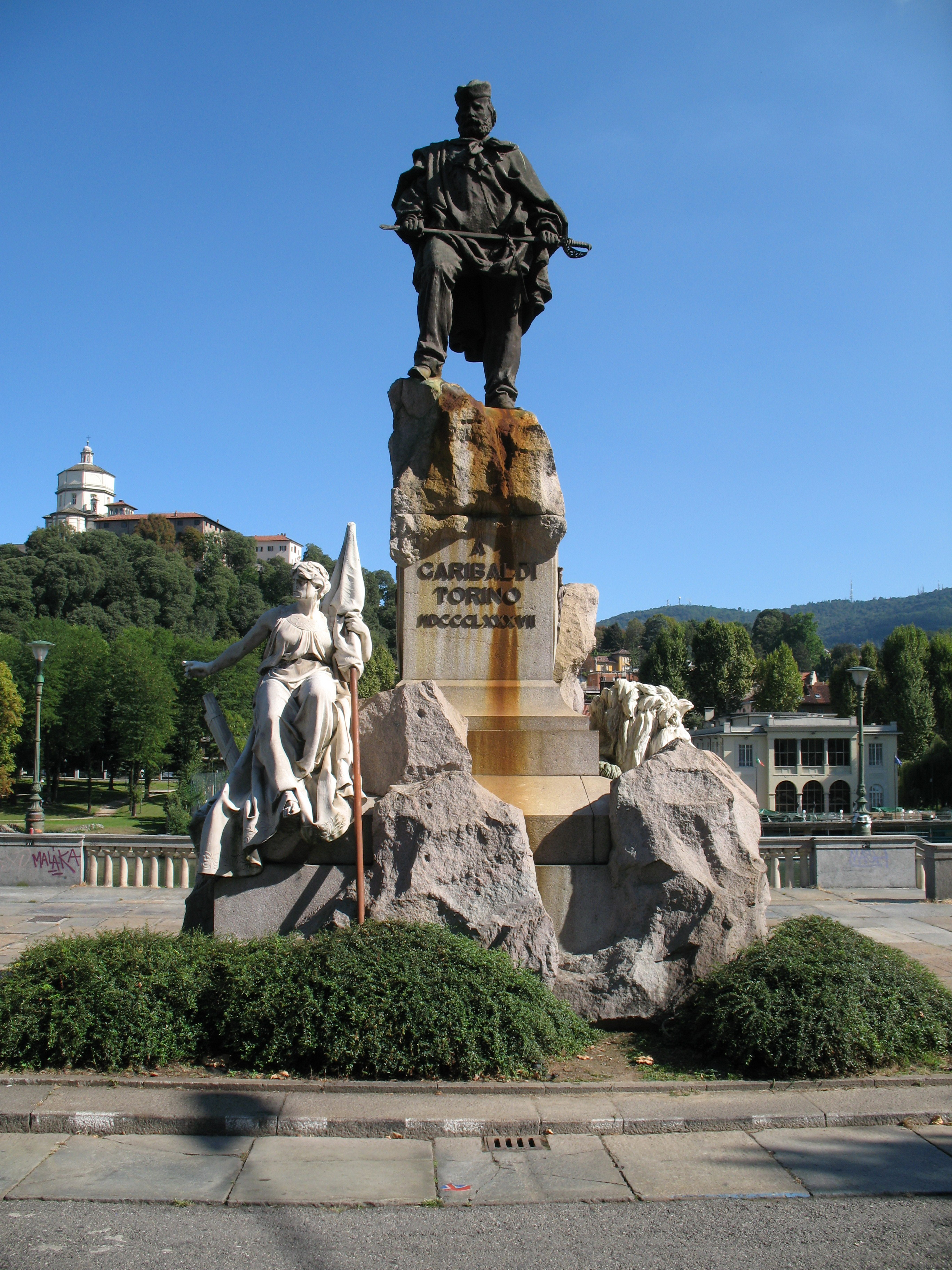 Monumento a Giuseppe Garibaldi, Torino, Italia